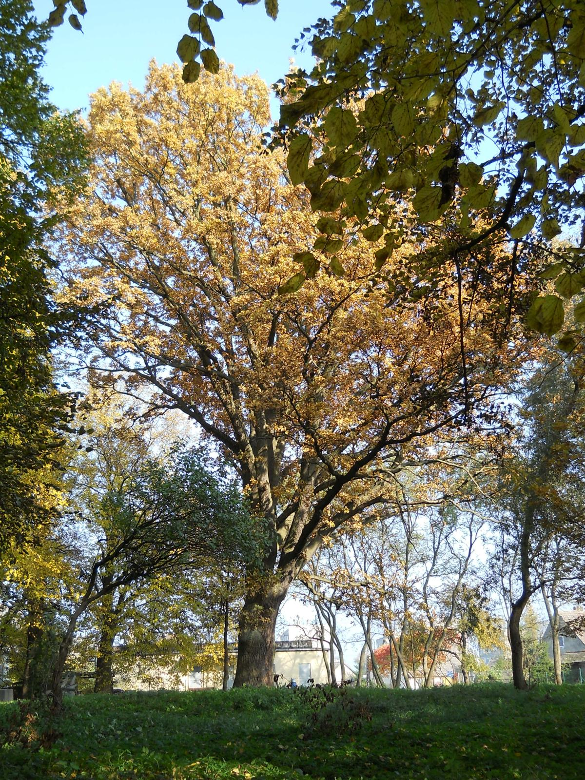 Wojcieszyce. Pomnik przyrody (dąb szypułkowy).